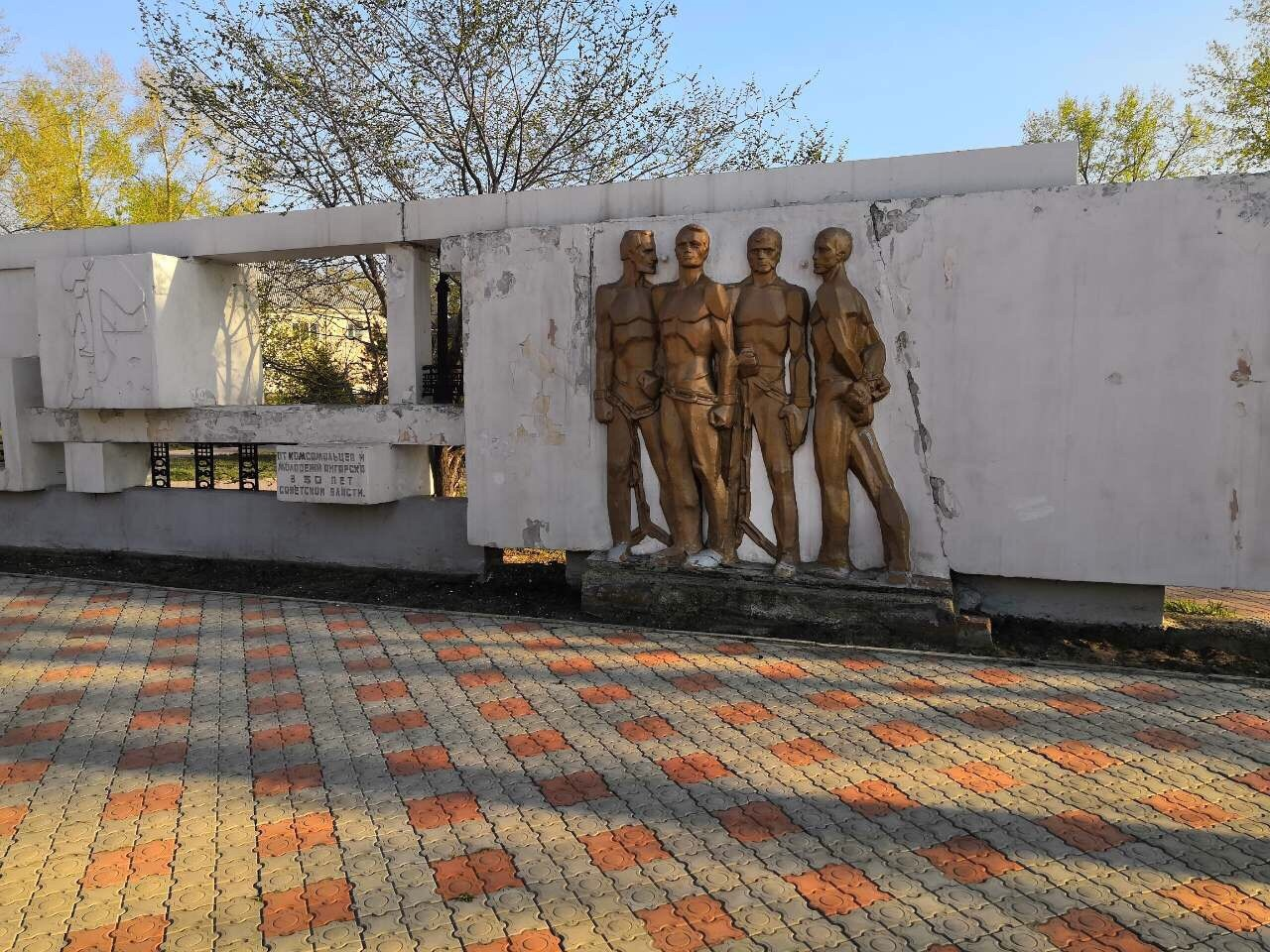 Фигуры четырёх мужчин на памятнике. Можно заметить бетонную "обувь" на ногах.